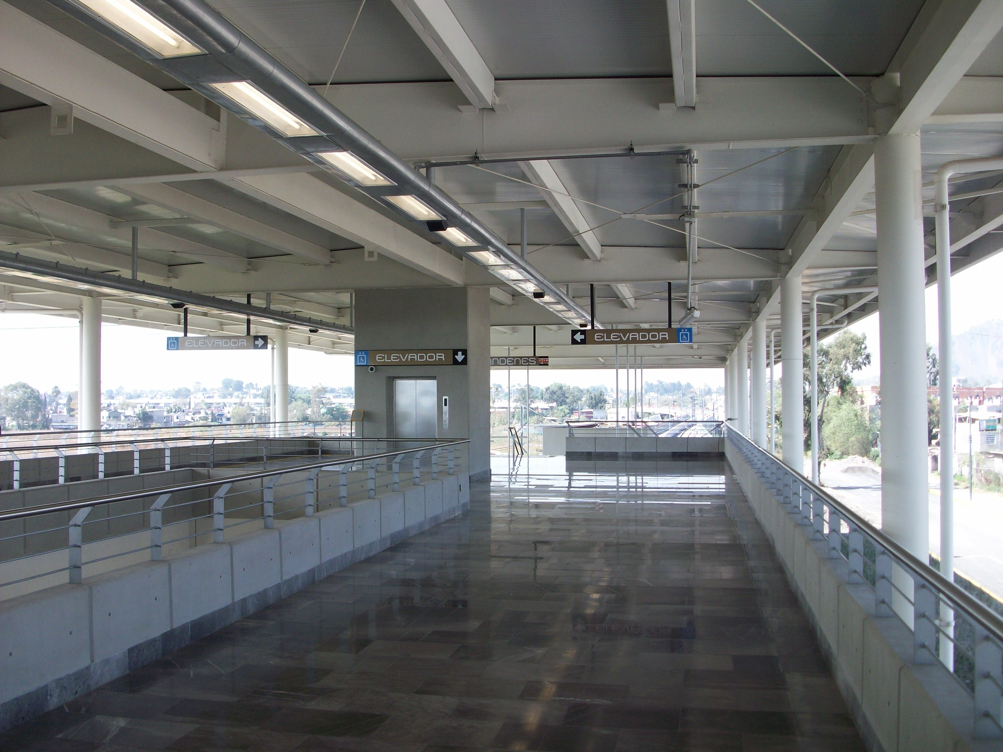 Vestibulo estacion Tlaltenco